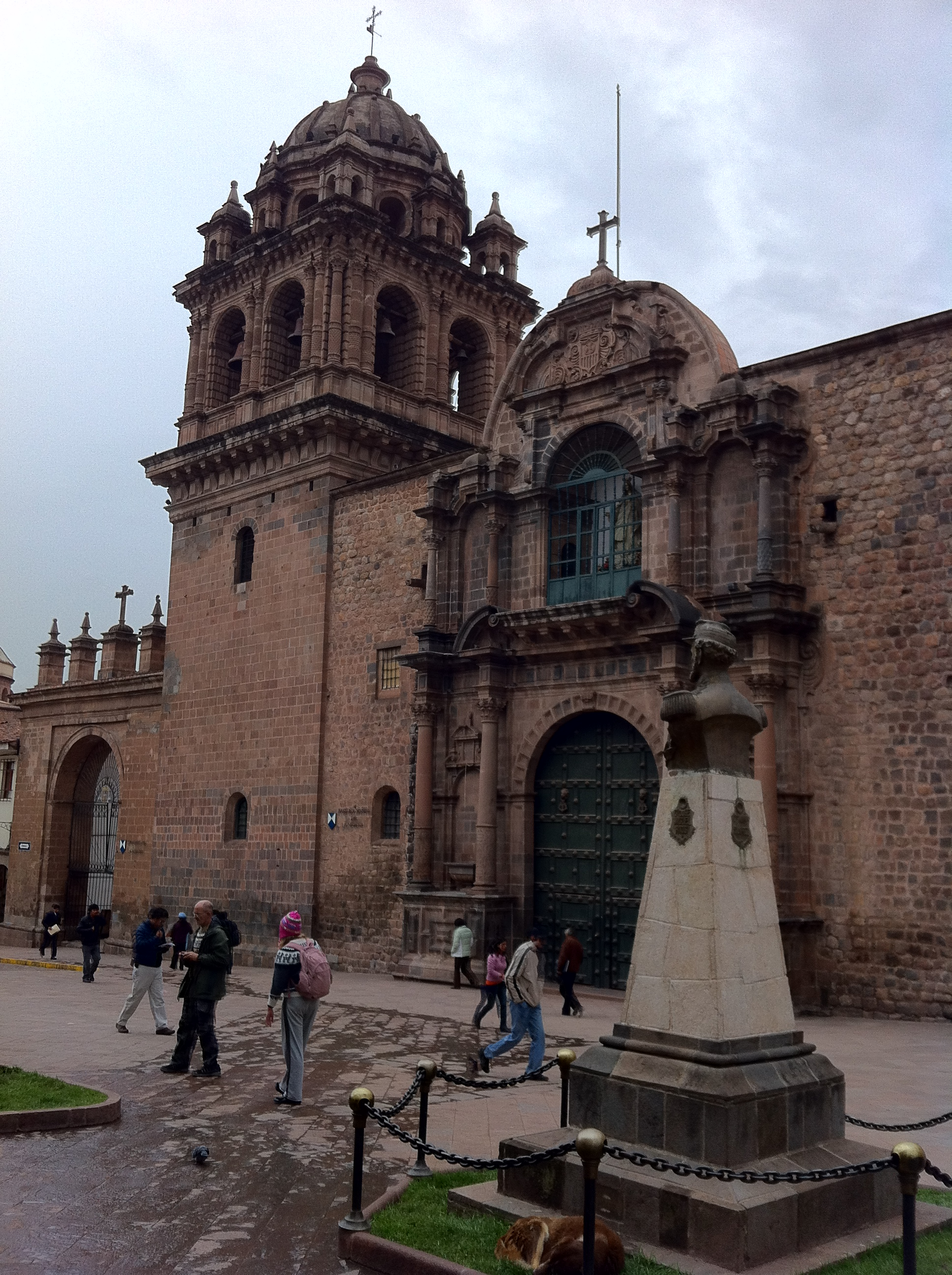 Convento de La Merced